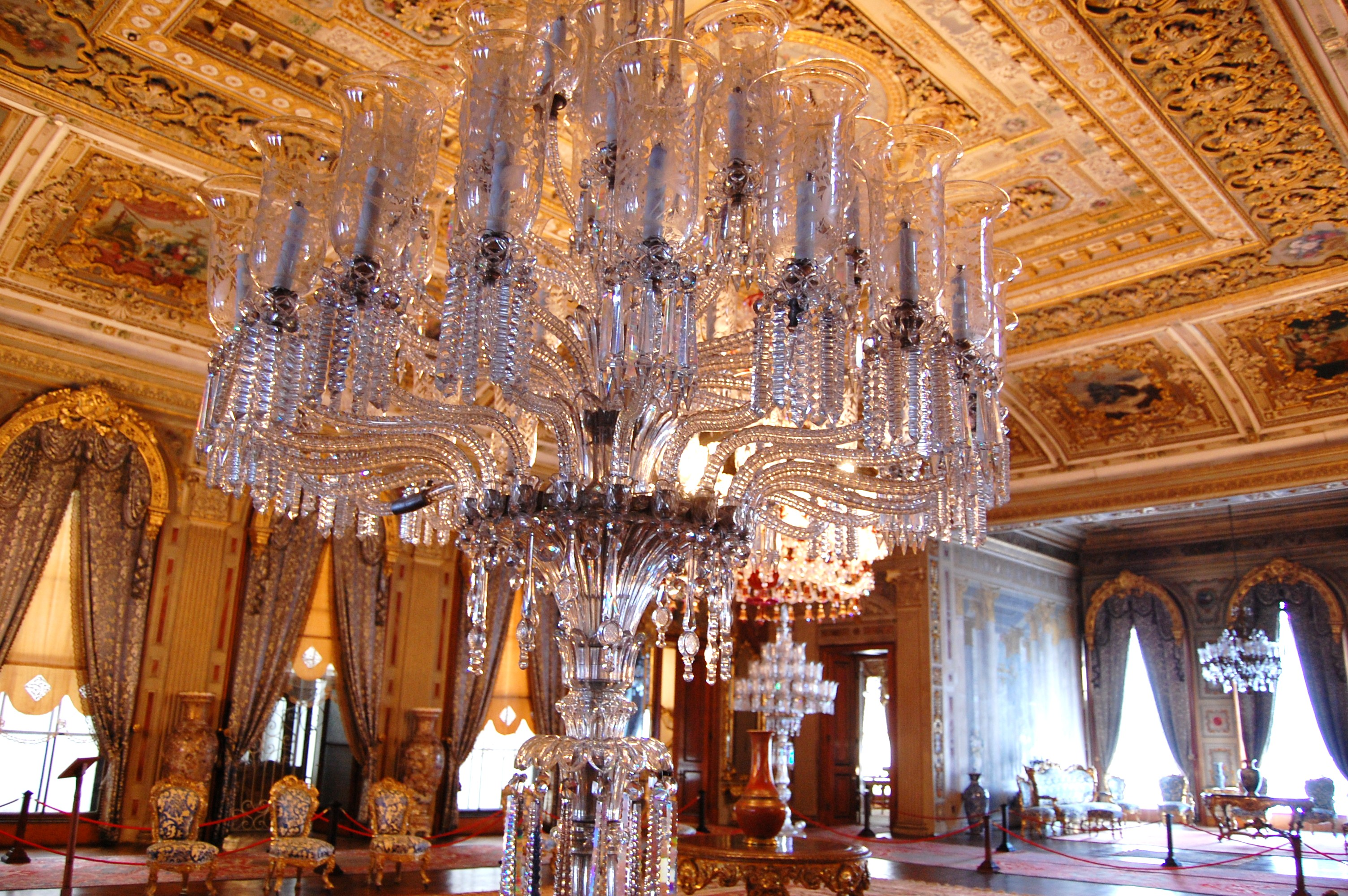 Dolmabahçe Palace